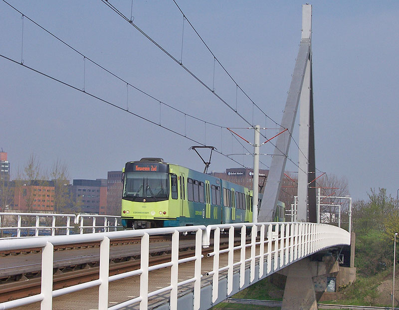 Sneltram op de Jutphasespoorbrug bij Nieuwegein (niet de Paul Krugerbrug; die ligt bij de Graadt van Roggenweg in Utrecht)